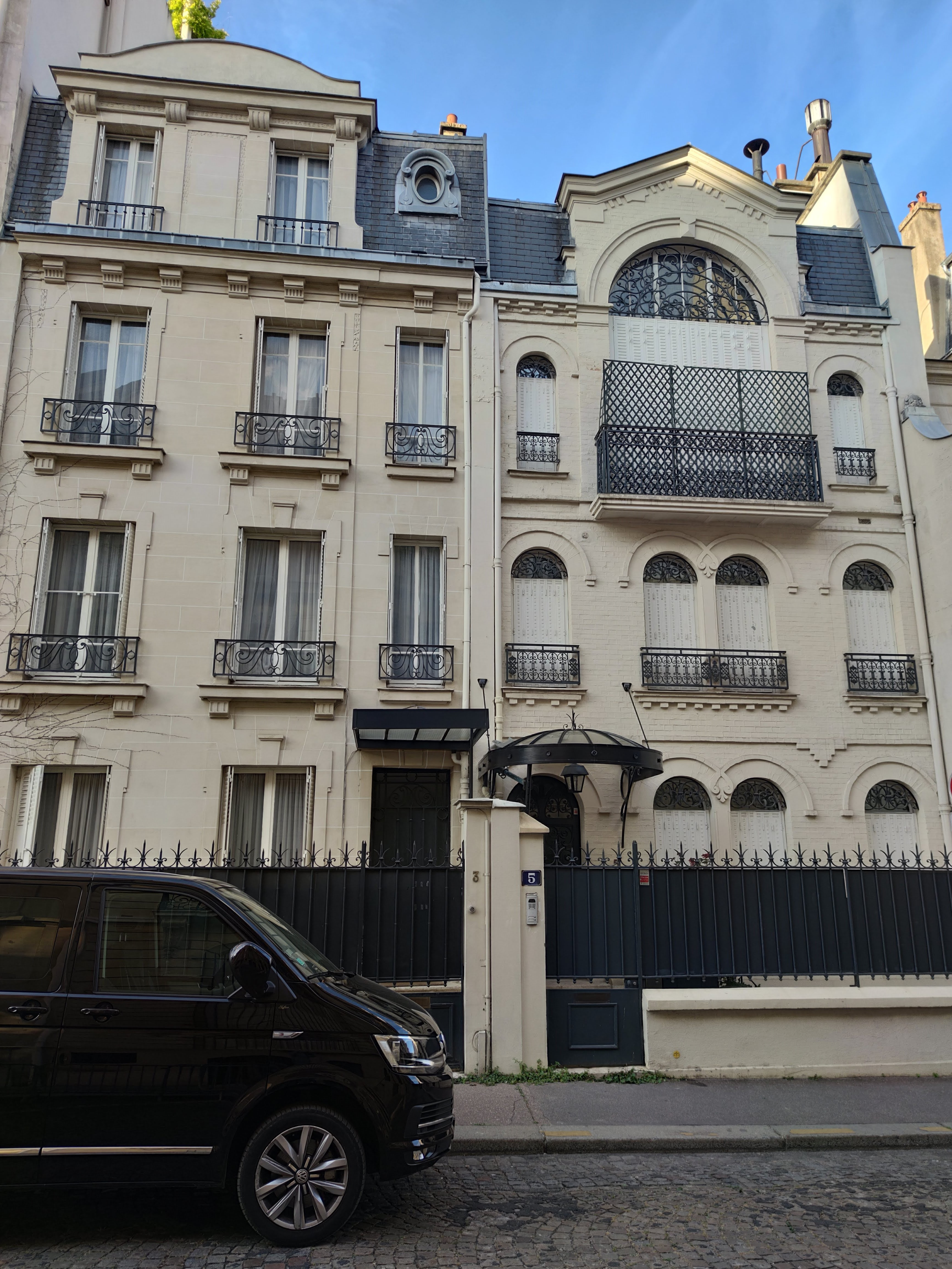 3-5, rue Benouville, Paris 16e.